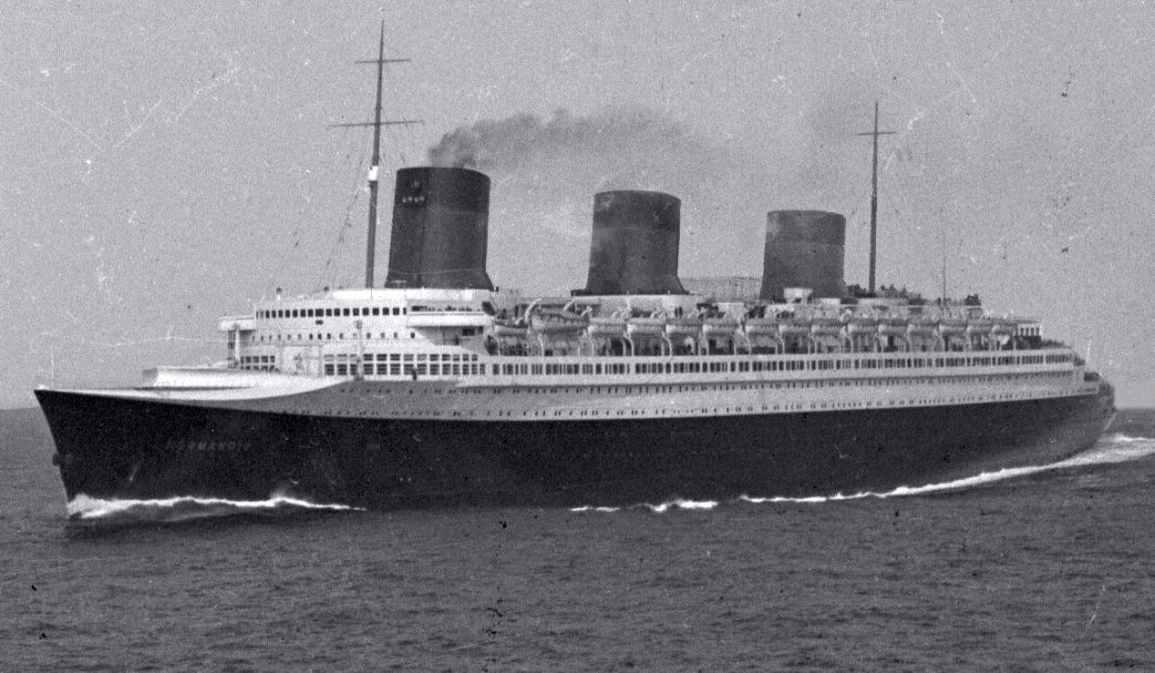 SS Normandie